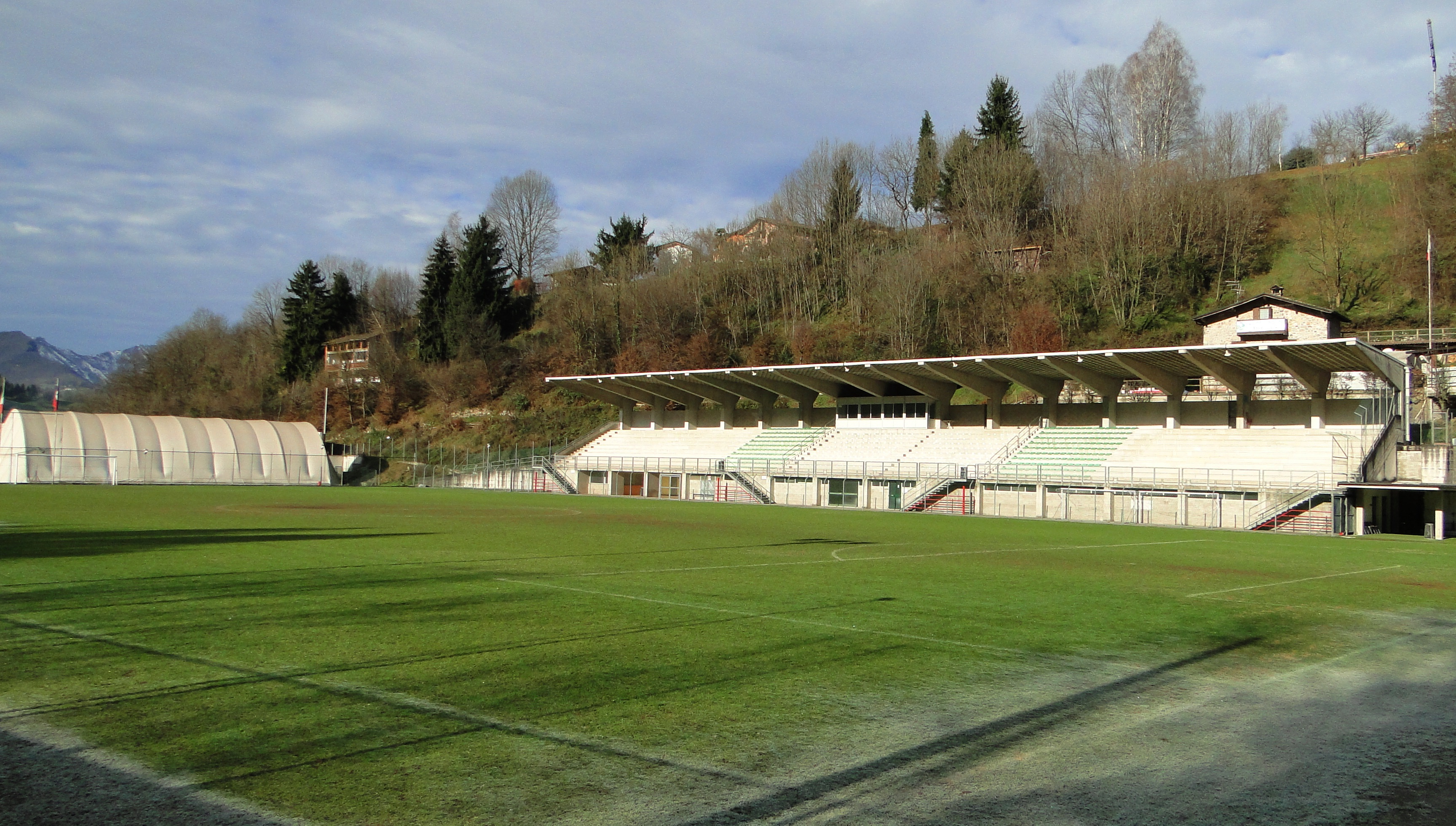 Stadio Martinelli. Leffe (BG). Italy